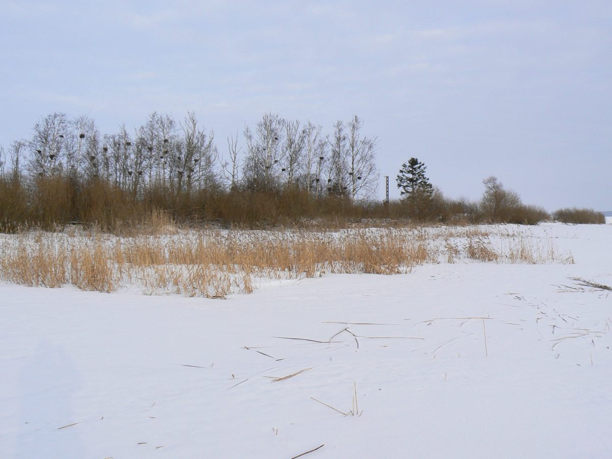 Tondisaar